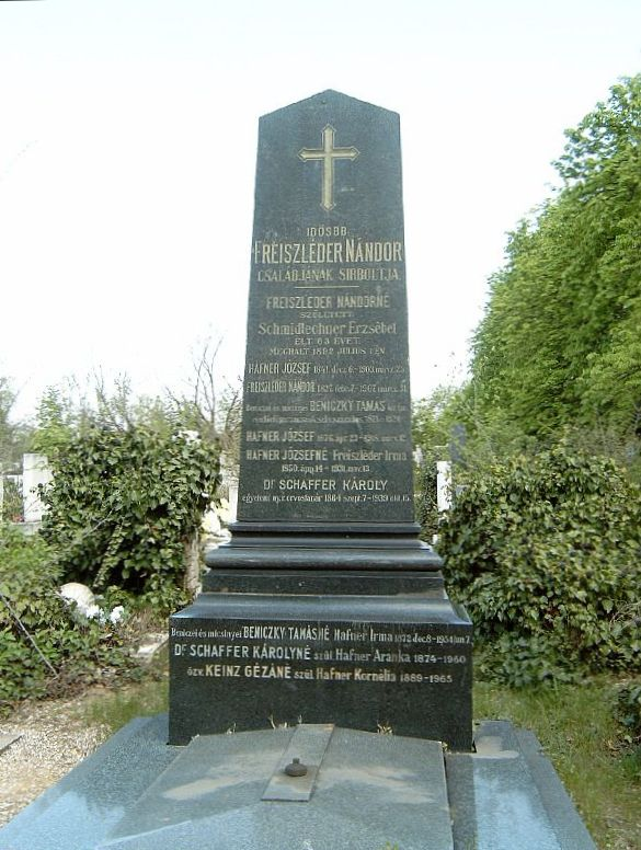 Schaffer Károly (Bécs, 1864. szeptember 7. – Budapest, 1939. október 16.) ideg-elmegyógyász, egyetemi tanár, a Freiszleder, a Hafner és a Beniczky-család sírja Budapesten. Új köztemető: 16/5-1-46/47.